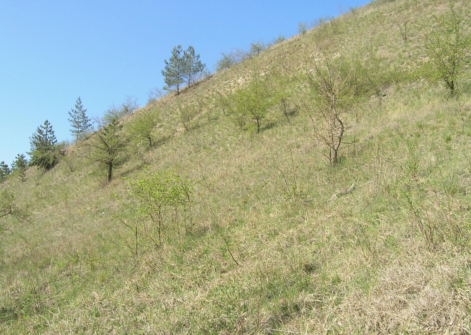 Nature reserve Lochkovský profil Národní přírodní památka Lochkovský profil